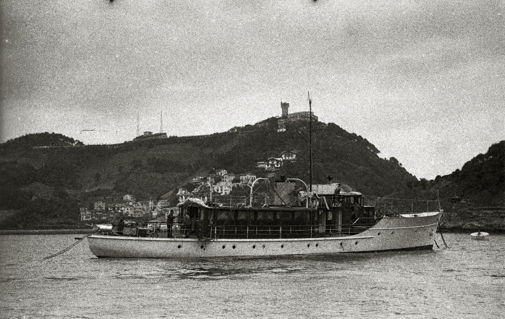 Título original: El barco de Francisco Franco, el Azor, en la bahía de la Concha (2/2) Localización: San Sebastián (Guipúzcoa)